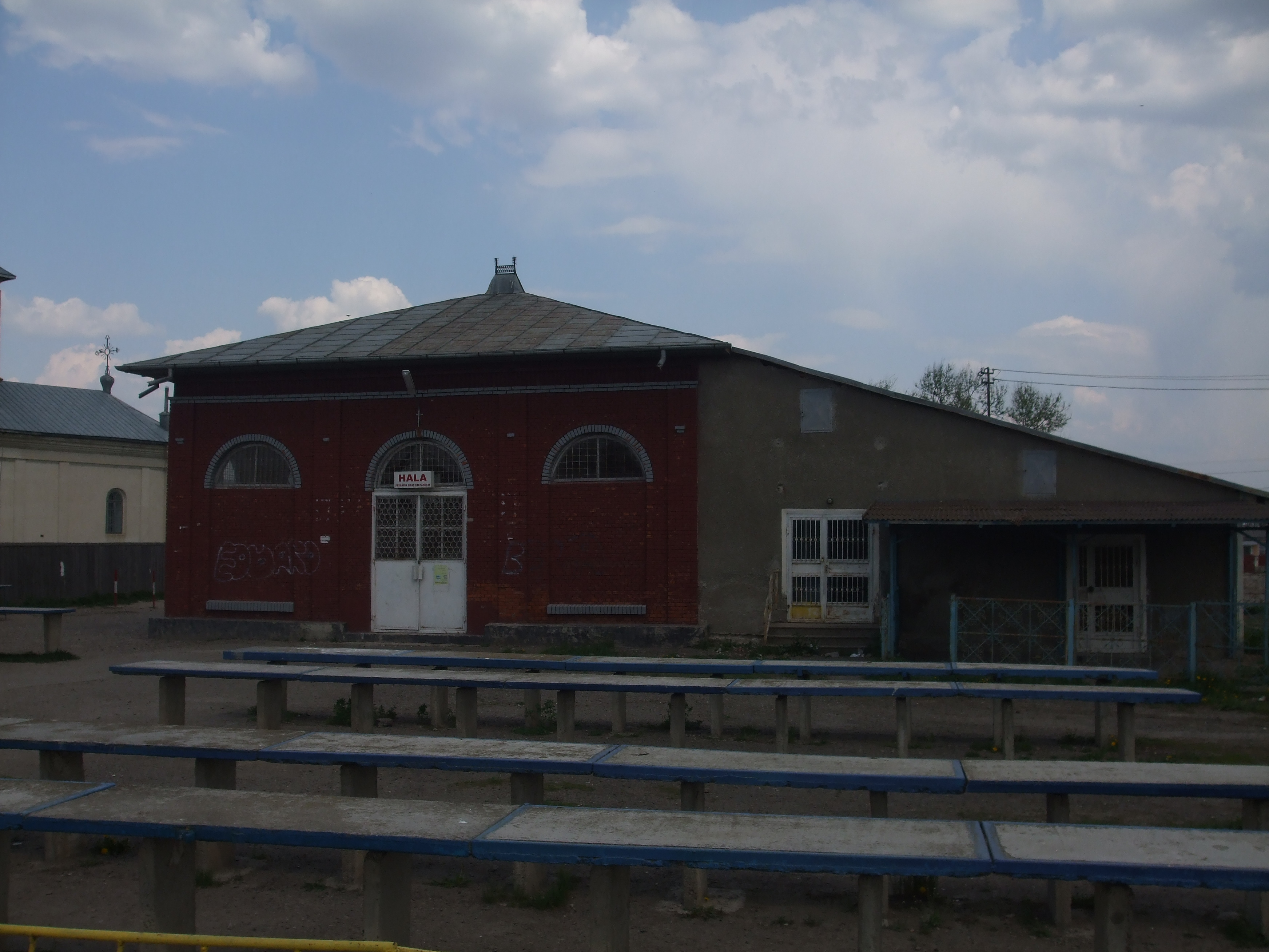 Hală de carne